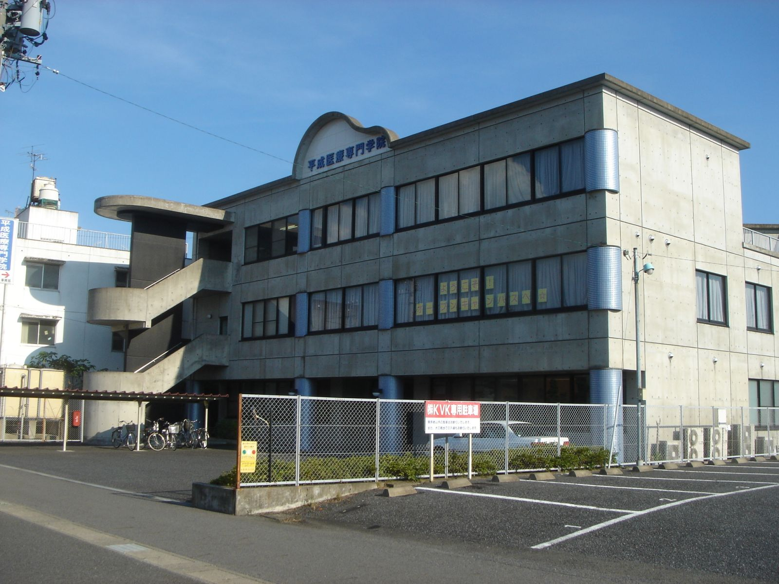 平成医療専門学院、岐阜県岐阜市で撮影。